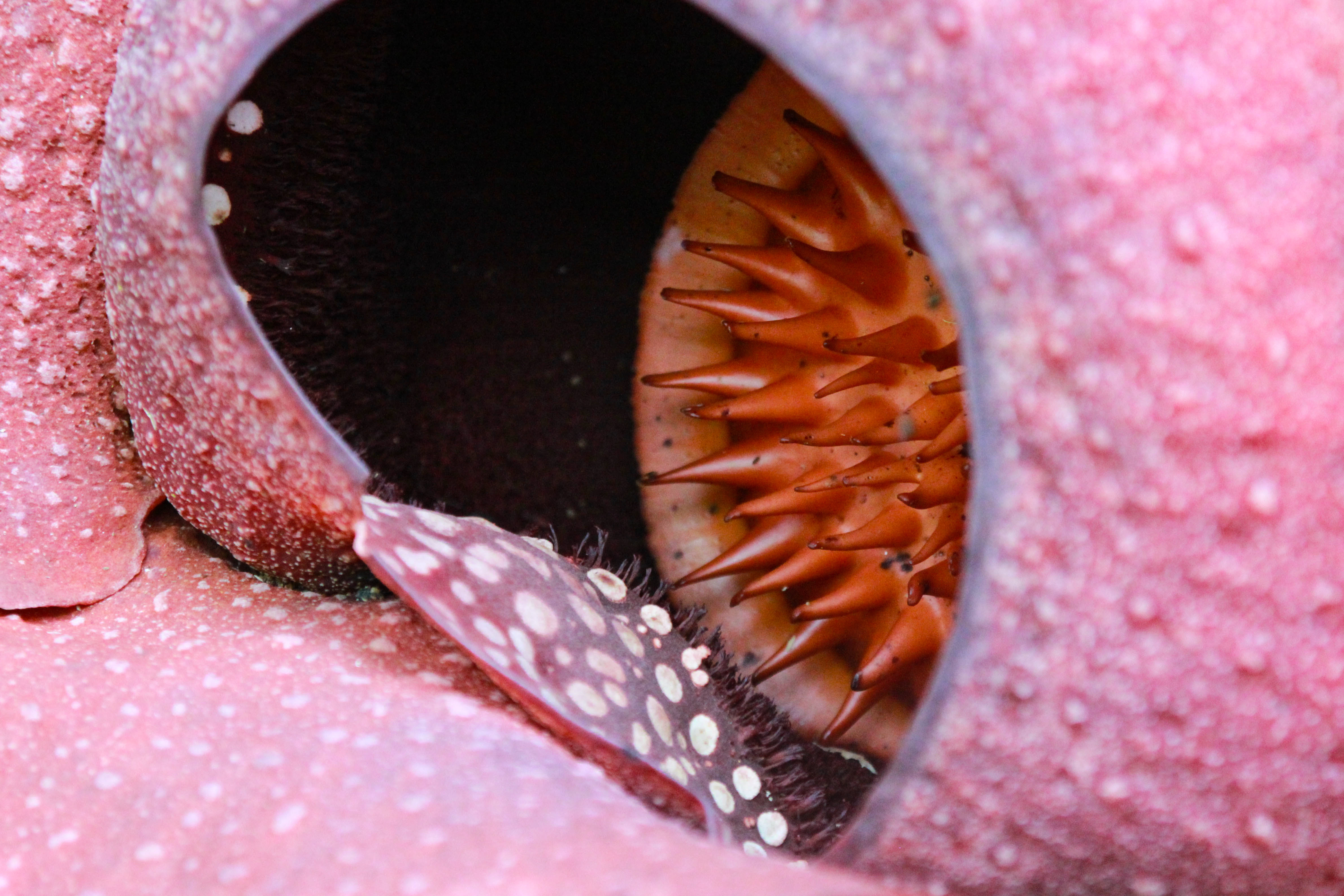 Rafflesien, Cameron Highlands, Malaysia